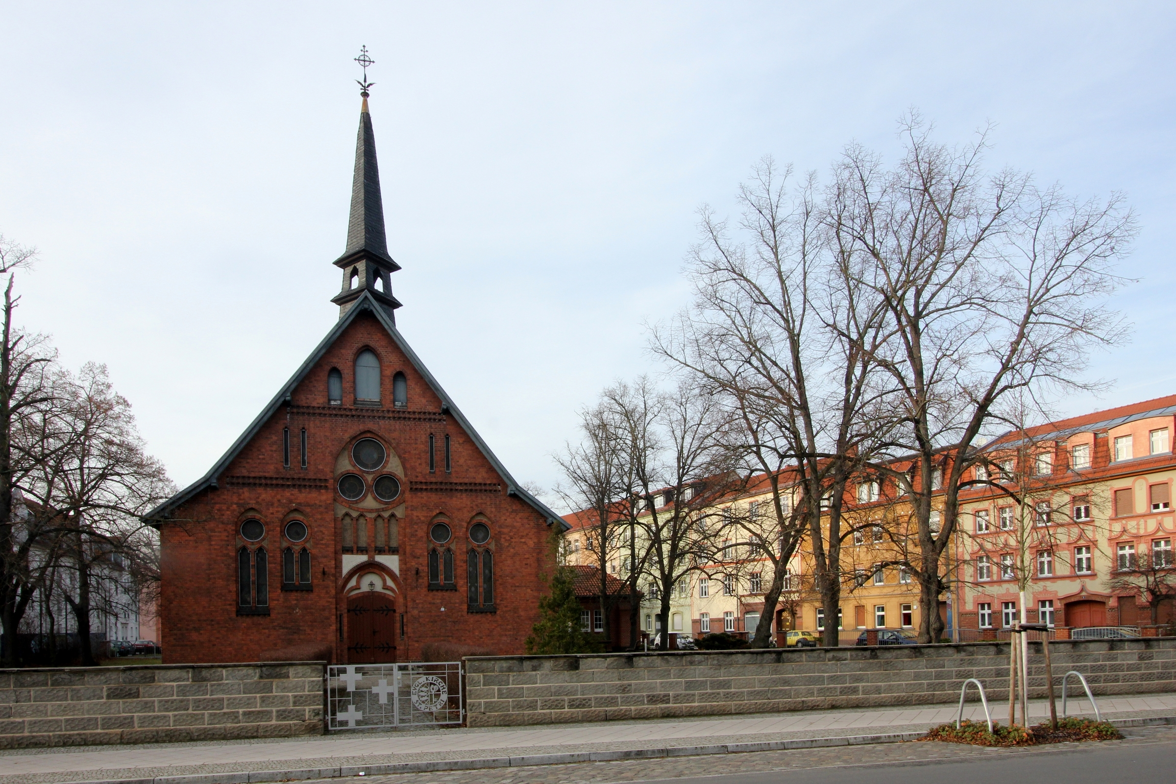 Luckenwalde in Brandenburg. Die Kirche St. Petri in der Frankenstraße 10 steht unter Denkmalschutz.